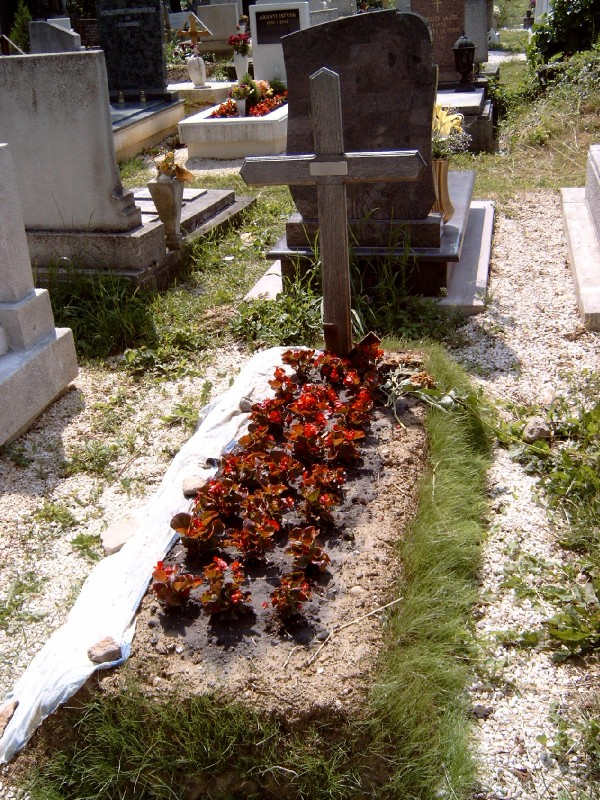 Gion Nándor sírja Budapesten. Farkasréti temető: 27-4-21.